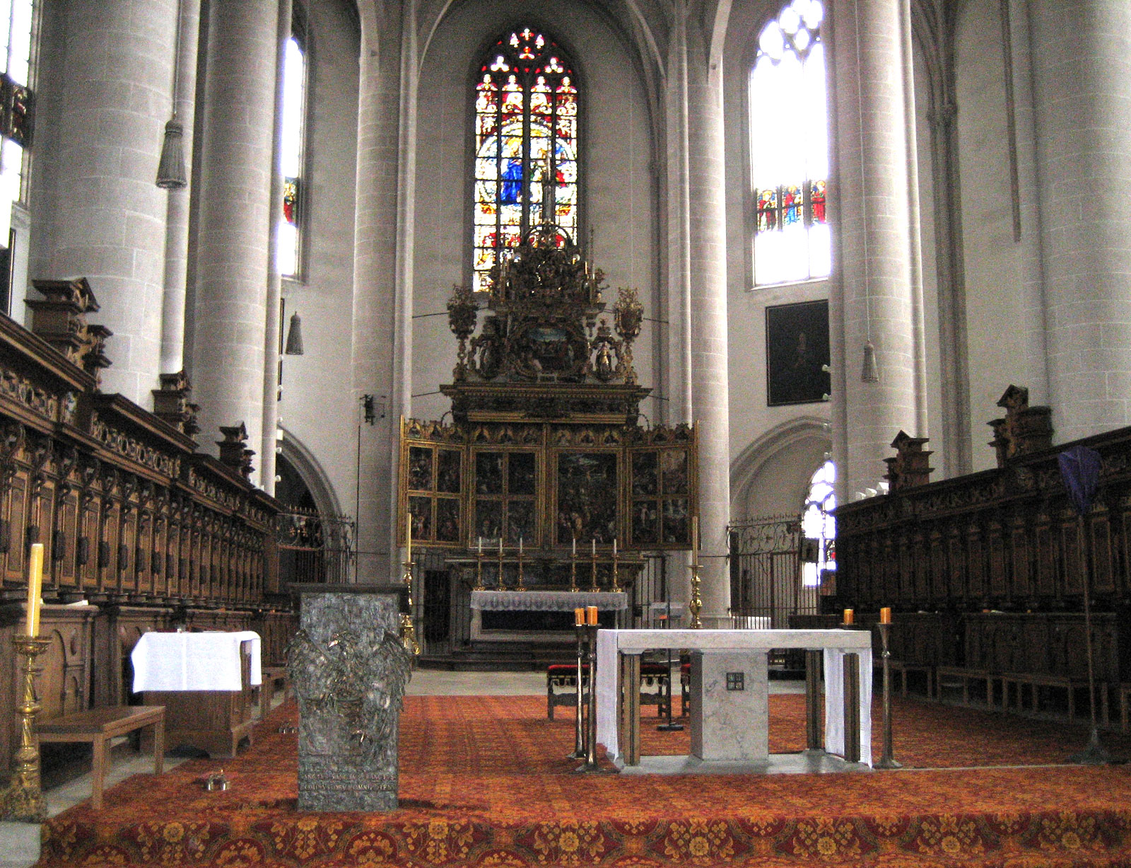 Hochaltar des Ingolstädter Münsters zur Schönen unserer Lieben Frau